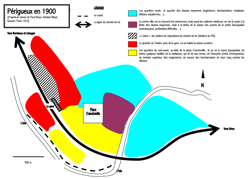 Carte de Périgueux en 1900, d’après le roman de Paul Nizan, Antoine Bloyé, Grasset, Paris 1933.